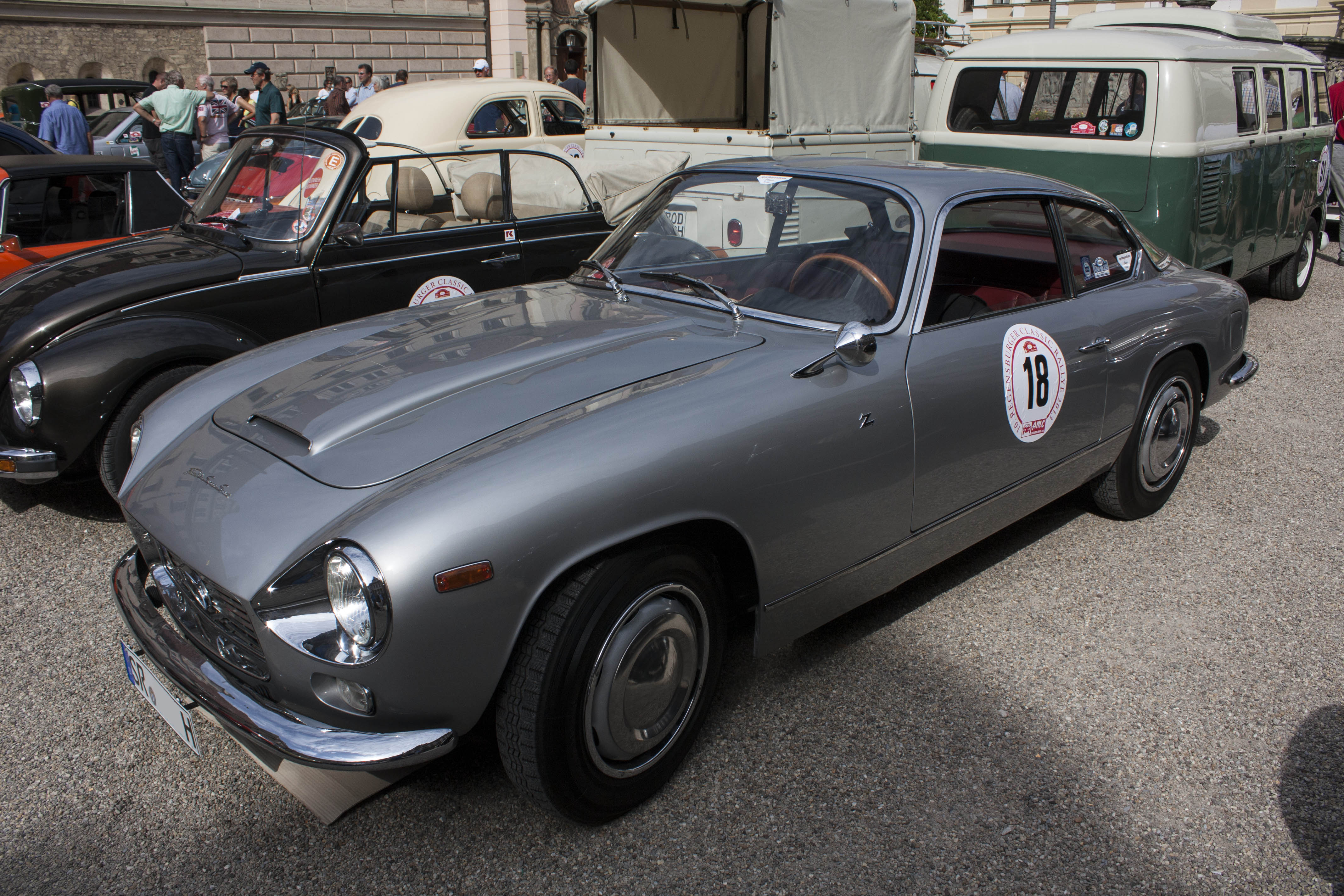 Lancia Flaminia Supersport (Bj. 1964-1967)